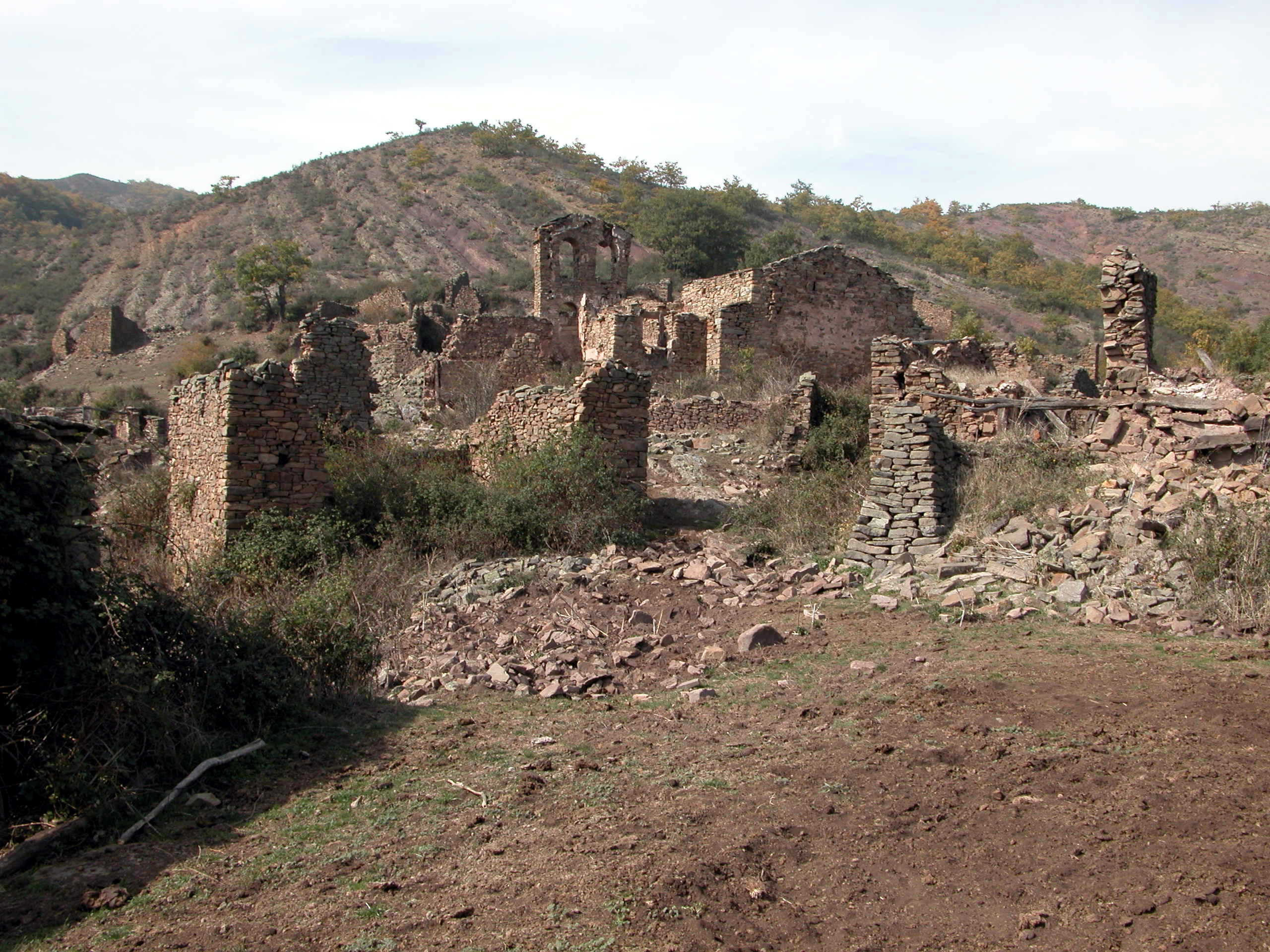 Reinares, despoblado de Santa Engracia del Jubera en La Rioja (España).